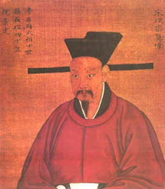 songlizong